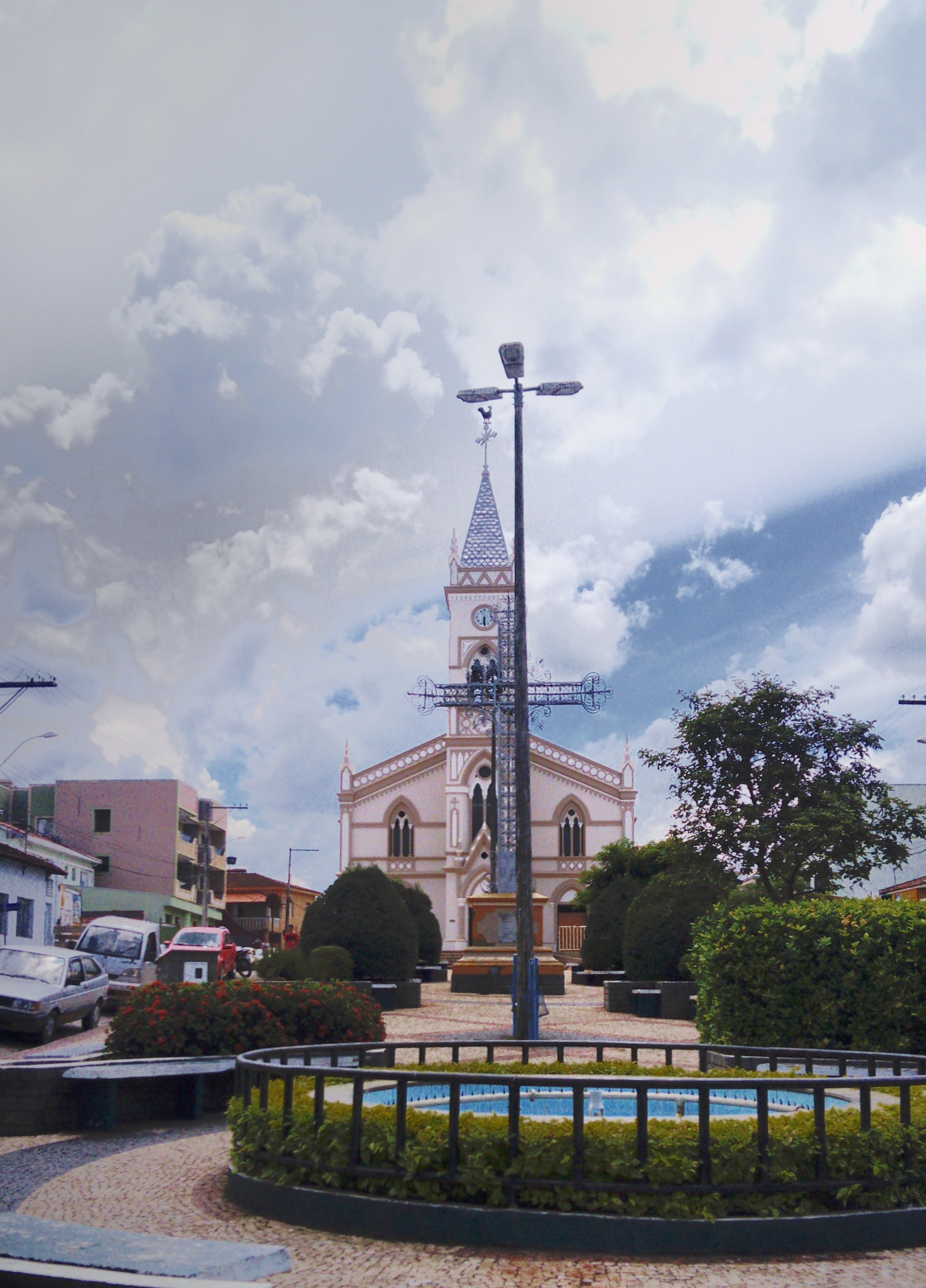 Igreja Matriz de Nossa Senhora do Assunção em Cabo Verde MG